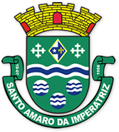 Brasão do município de Santo Amaro da Imperatriz.